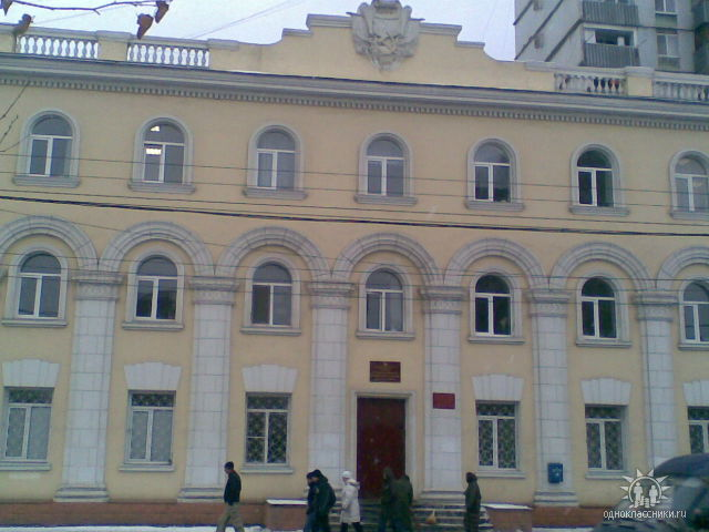 ММУ